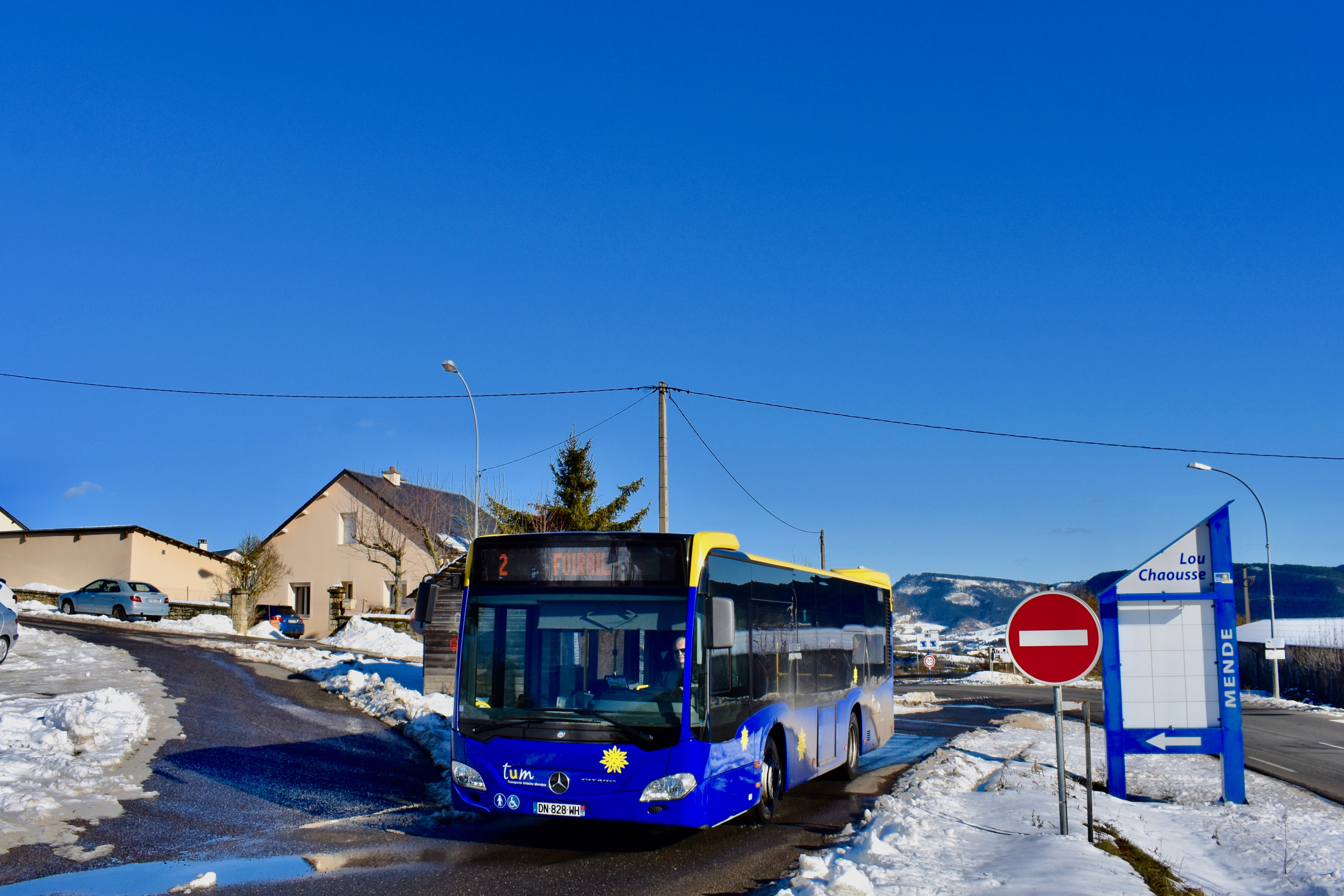 Véhicule du réseau Tum de Mende sur la ligne 2 aux Chabrits.